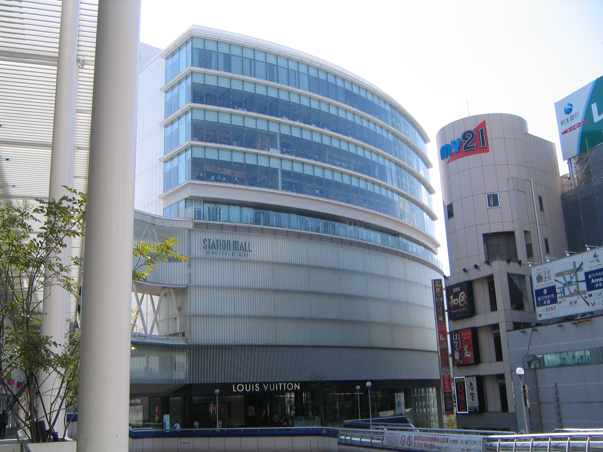 柏高島屋新館